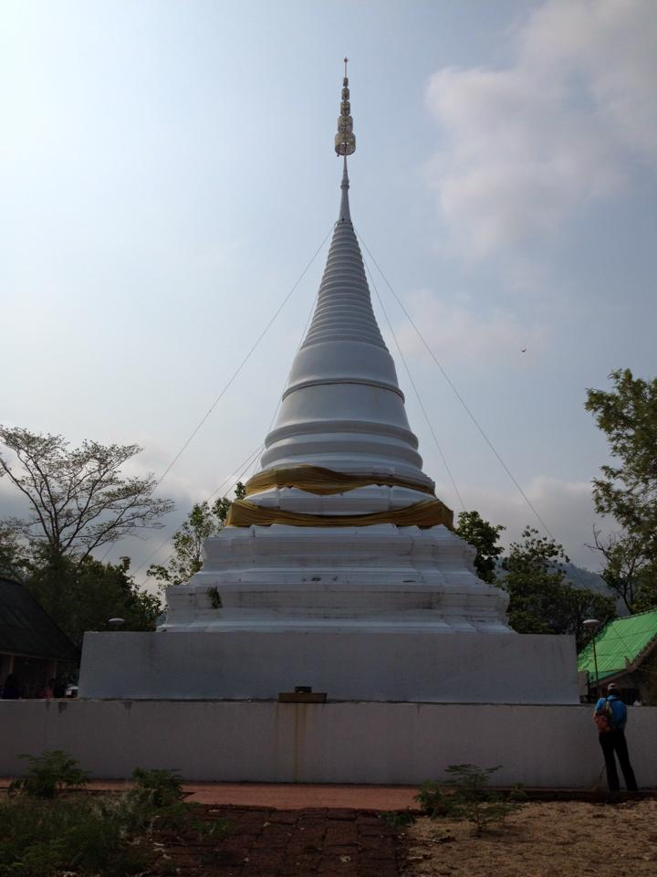 วัดม่อนพระยาแช่